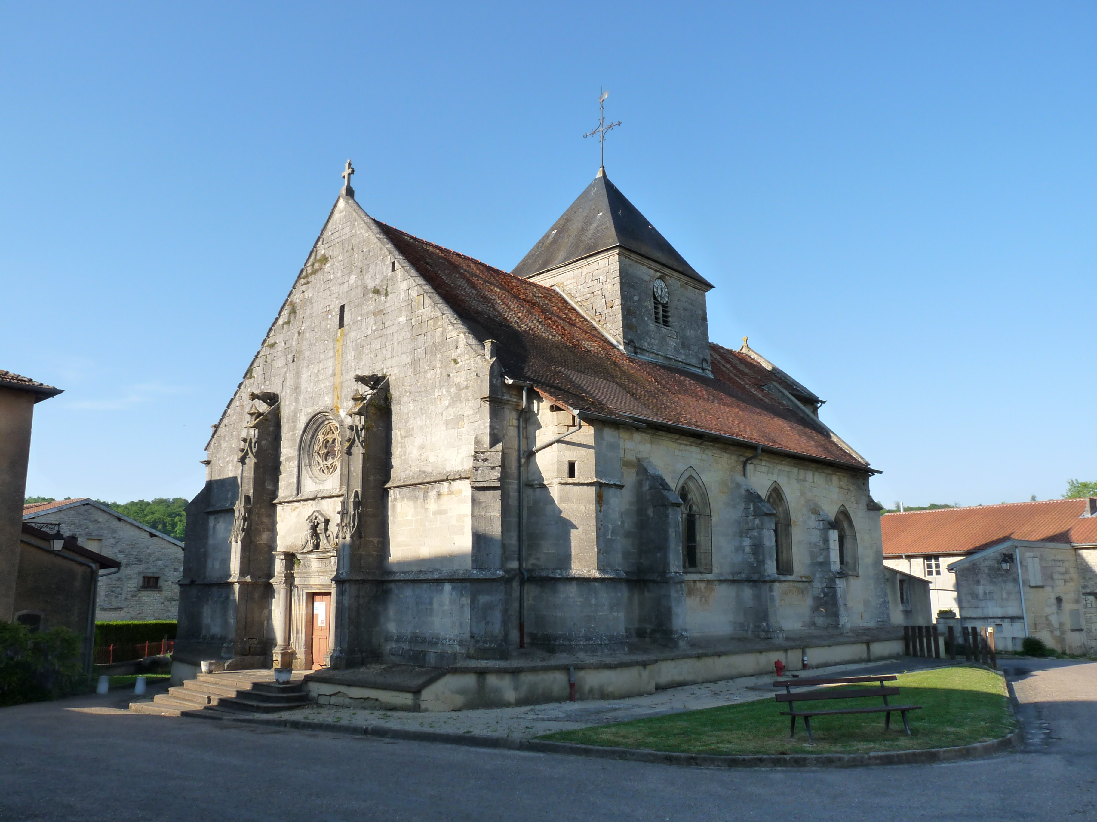 Eglise de Bazincourt-sur-Saulx (Meuse). Inscrite aux Monuments historiques en 1968.